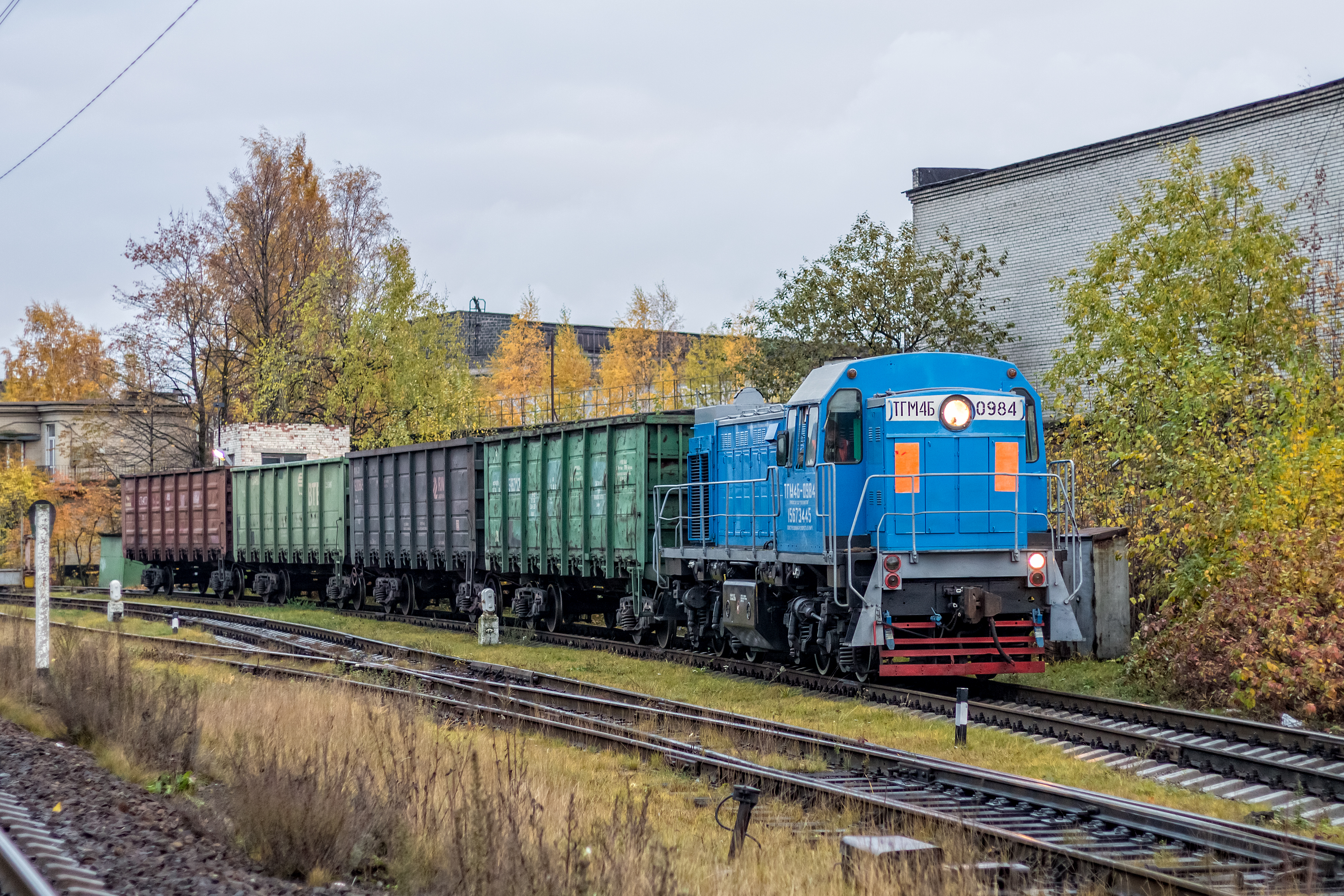 ТГМ4Б-0984, подъездной путь к Кировскому заводу см. фото 702616 в альбоме автора